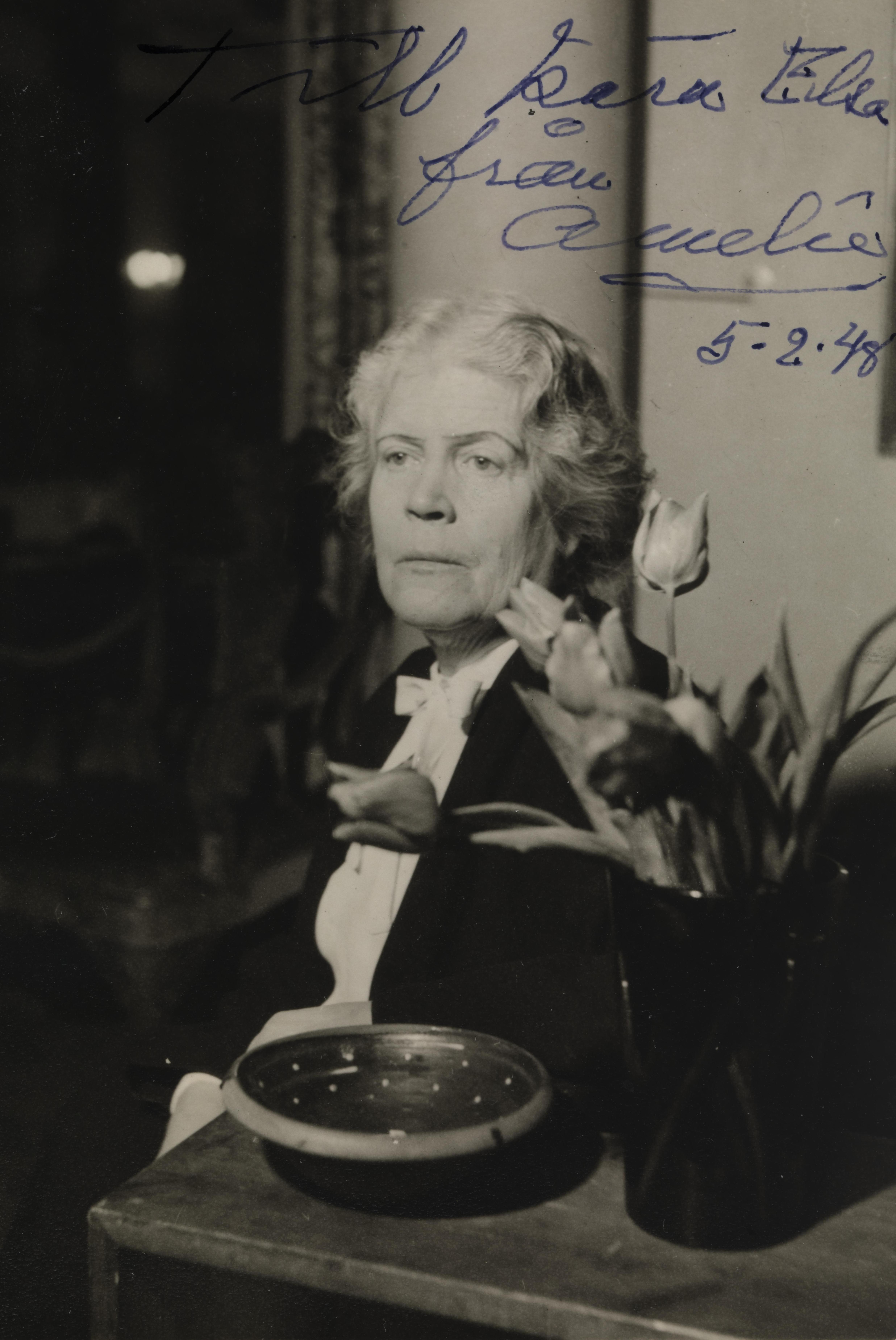 Bildet er hentet fra Nasjonalbibliotekets bildesamling Depicted person: Posse-Brazdova, Amelie